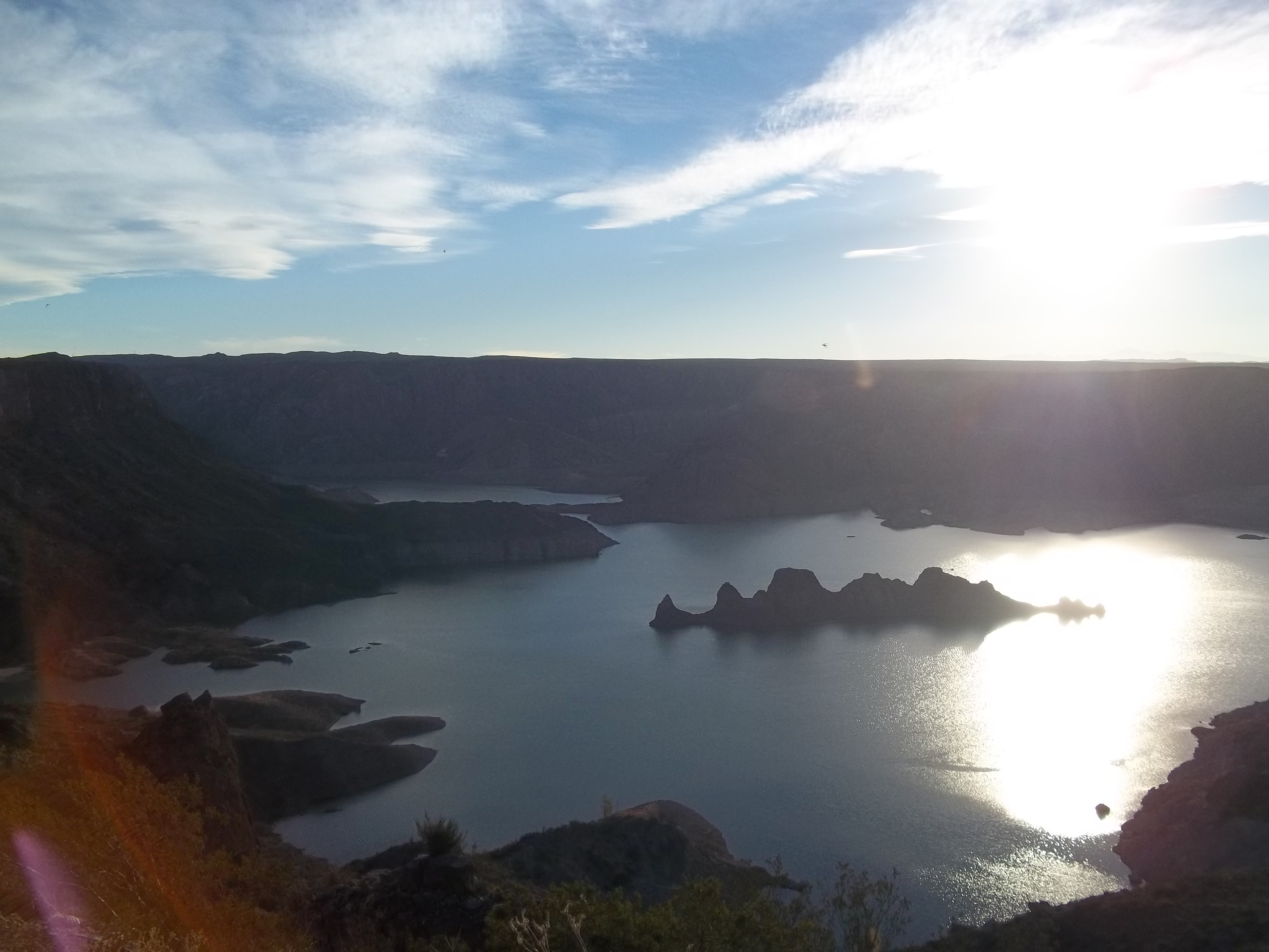 Formación de "El Submarino" en el embalse Valle Grande